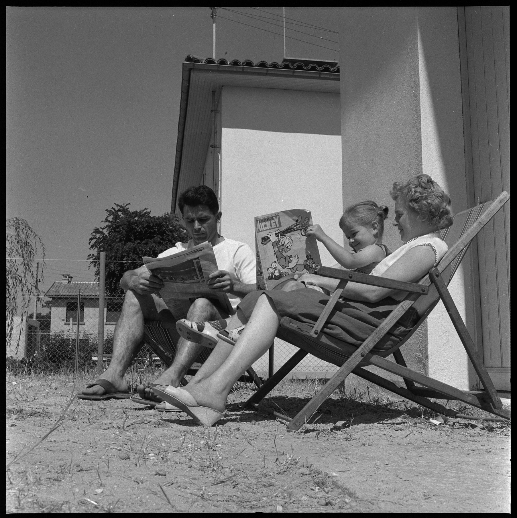 Domicile d'un joueur du Toulouse Football Club. Août 1959. Vue d'un joueur du Toulouse Football Club avec sa femme et sa fille sur des chaises longues dans le jardin.